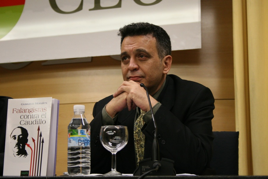 Gustavo Morales en la presentación de su último libro Falangistas contra el Caudillo